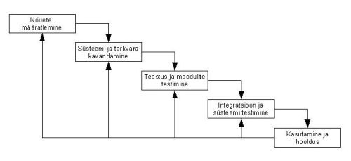 EUCIP, koskmudel